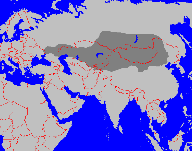 description : la carte représente l'empire des Hsiung-nu (Huns asiatiques) dans sa version la plus étendue. auteur: Postmann Michael (de) réalisée le: 17/08/2004